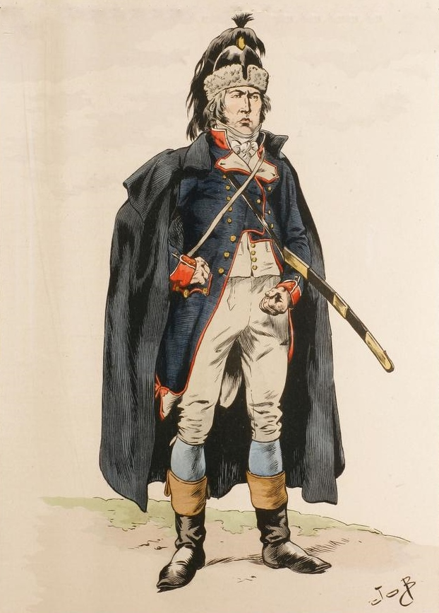 Officier de volontaires durant l'hiver 1792-1793.